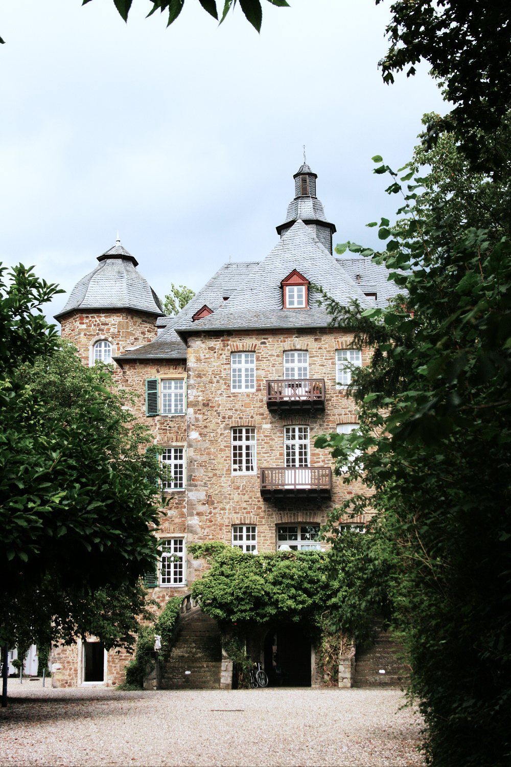 Schloss Allner, Hennef (Sieg)